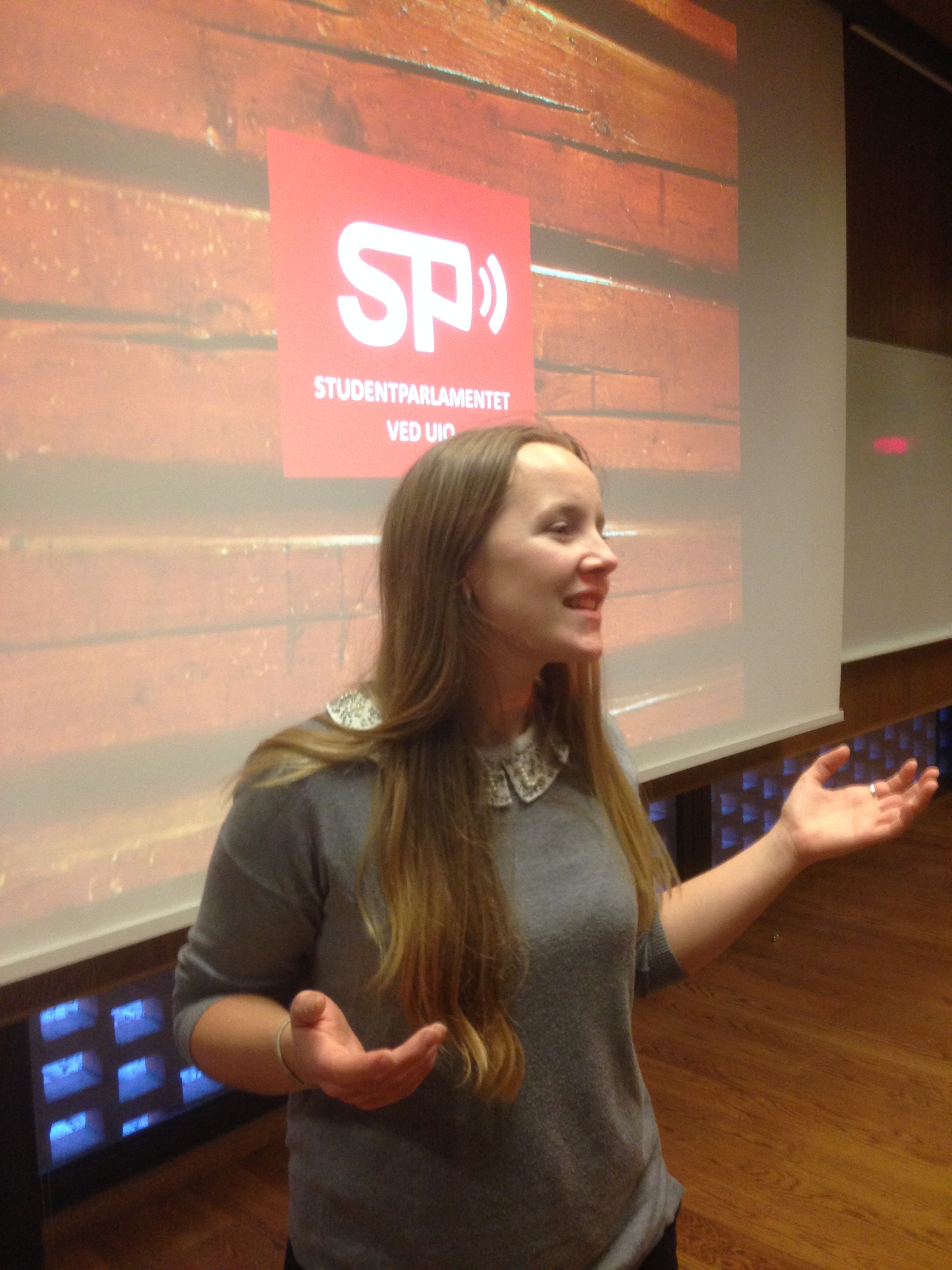 Leder av Studentparlamentet 2014-2015, Marianne Andenæs, taler under formøtet til UiO-delegasjonen foran NSO-landsmøtet 2015.